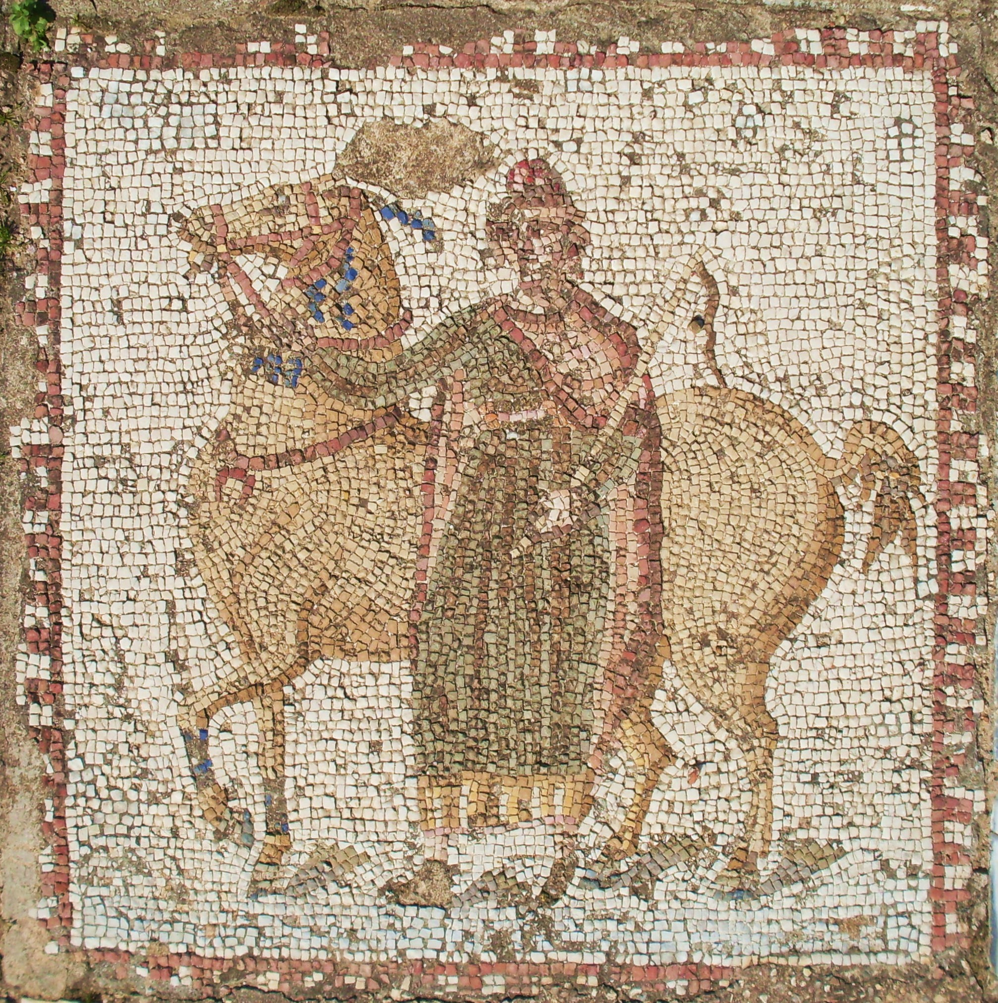 Panneau de la mosaïque des chevaux, Pelops selon J. W. Salomonson (1965)